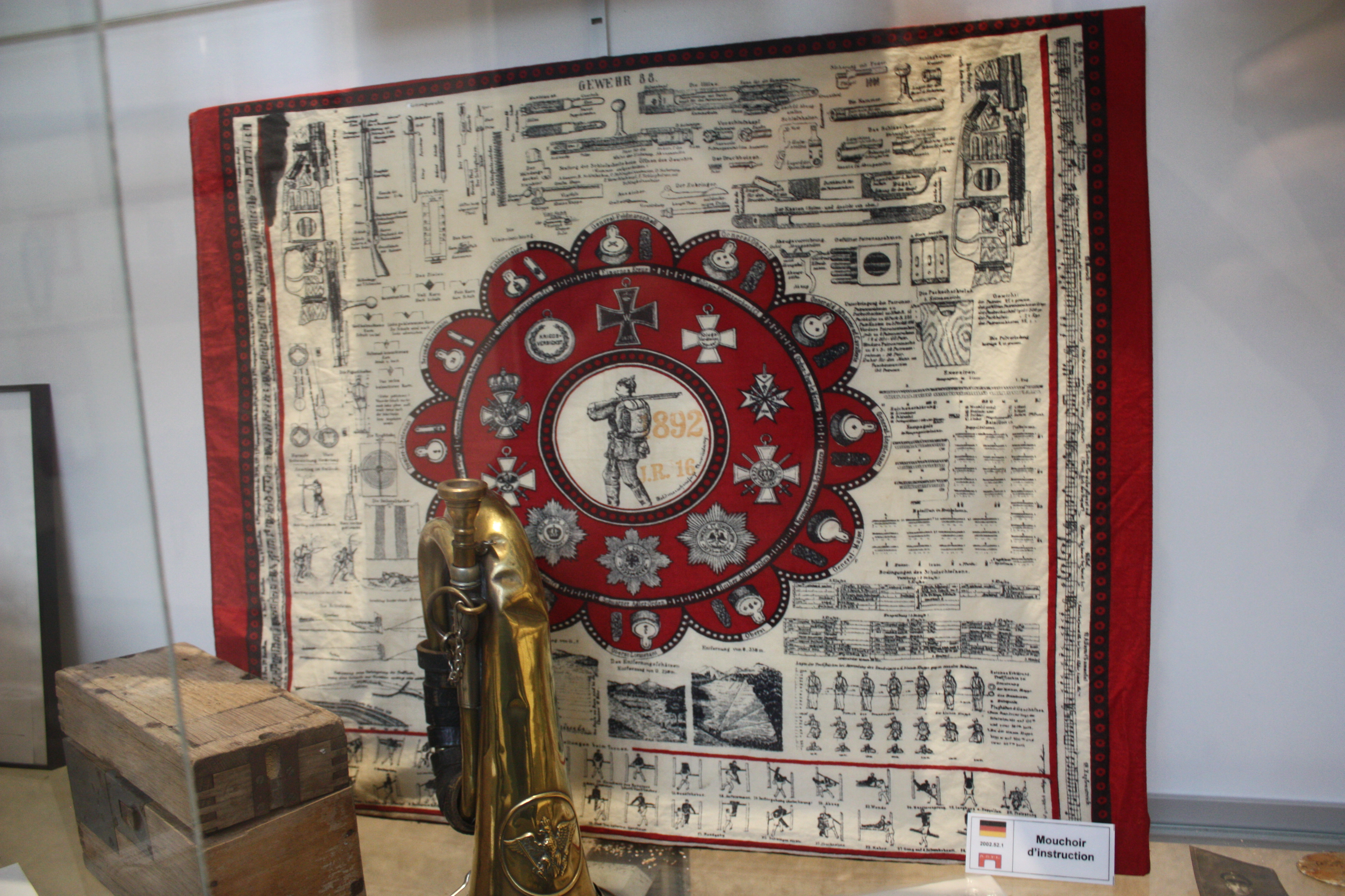 Collection du Fort de Leveau Mouchoir d'instruction allemand Gewehr 88